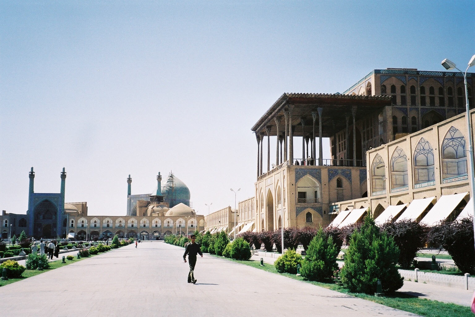 Ispahan: la place de l'imam Khomeiny, au fond la mosquée de l'imam, à droite le palais de `Ali Ghapu